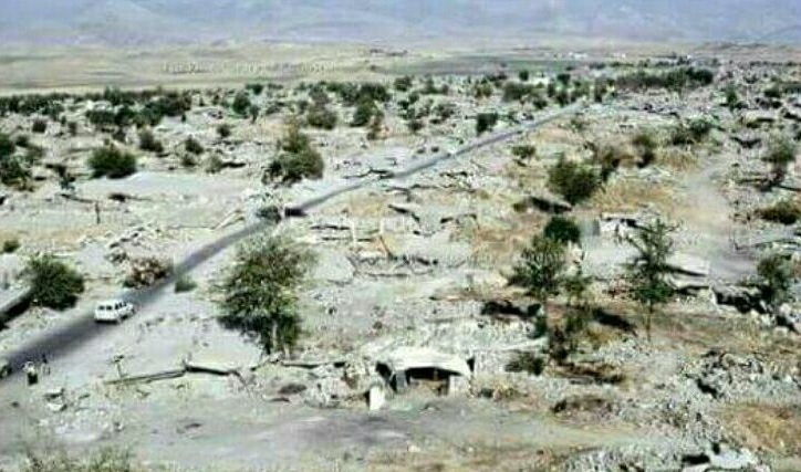 کوردی: سەیدسادق ١٩٨٨